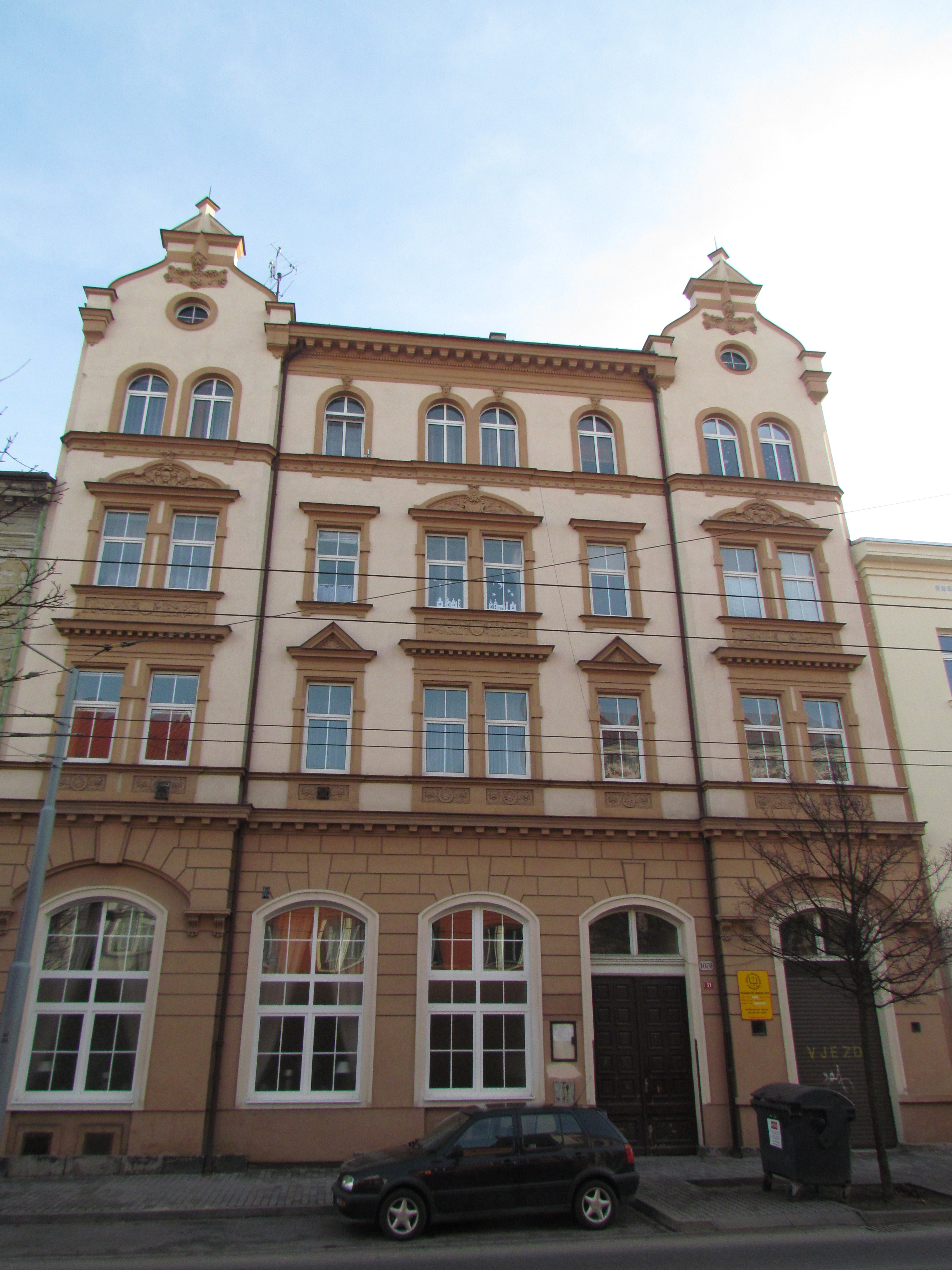 Sborový dům Církve bratrské, Doudlevecká ulice, Plzeň.